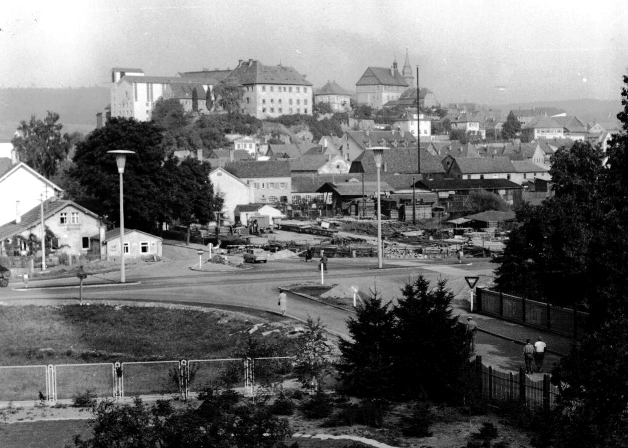 Die Kreuzung der B 289 mit der Burgkunstadter Bahnhofsstraße. In der Bildmitte sieht man den Lagerplatz des damals größten Bauunternehmens, der Firma Michael Pauler